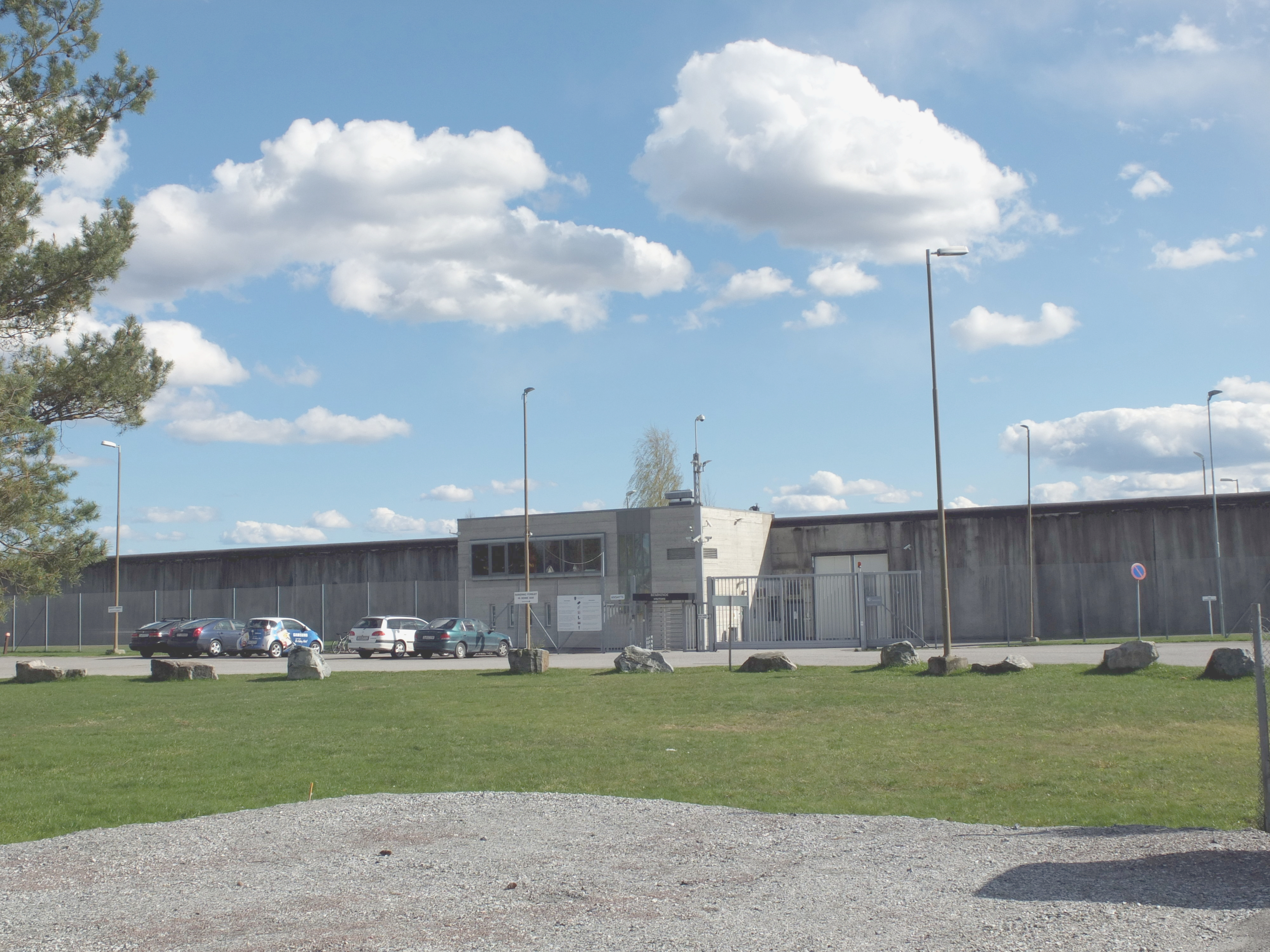 Ullersmo fengsel